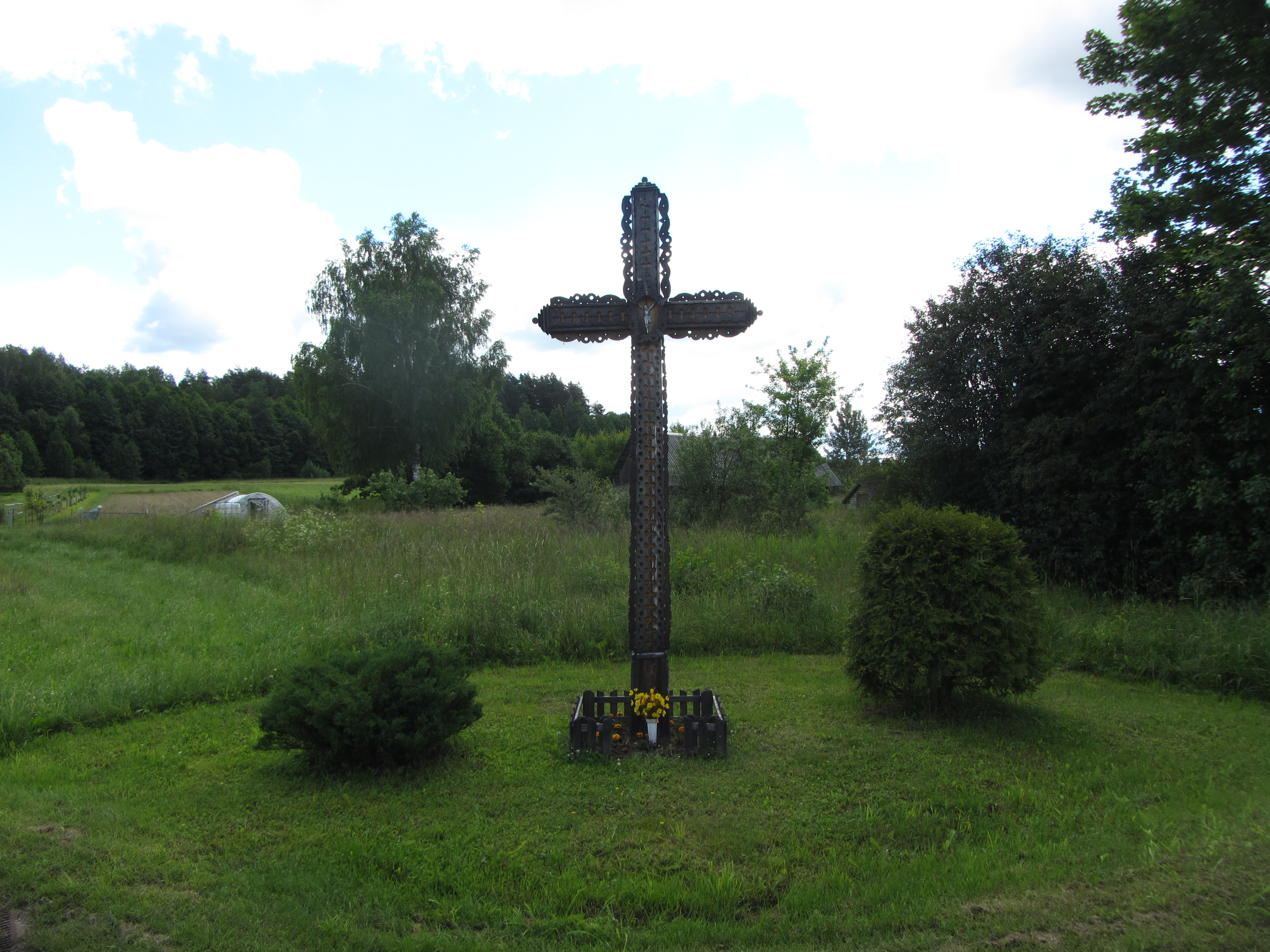 Šutai, Lithuania